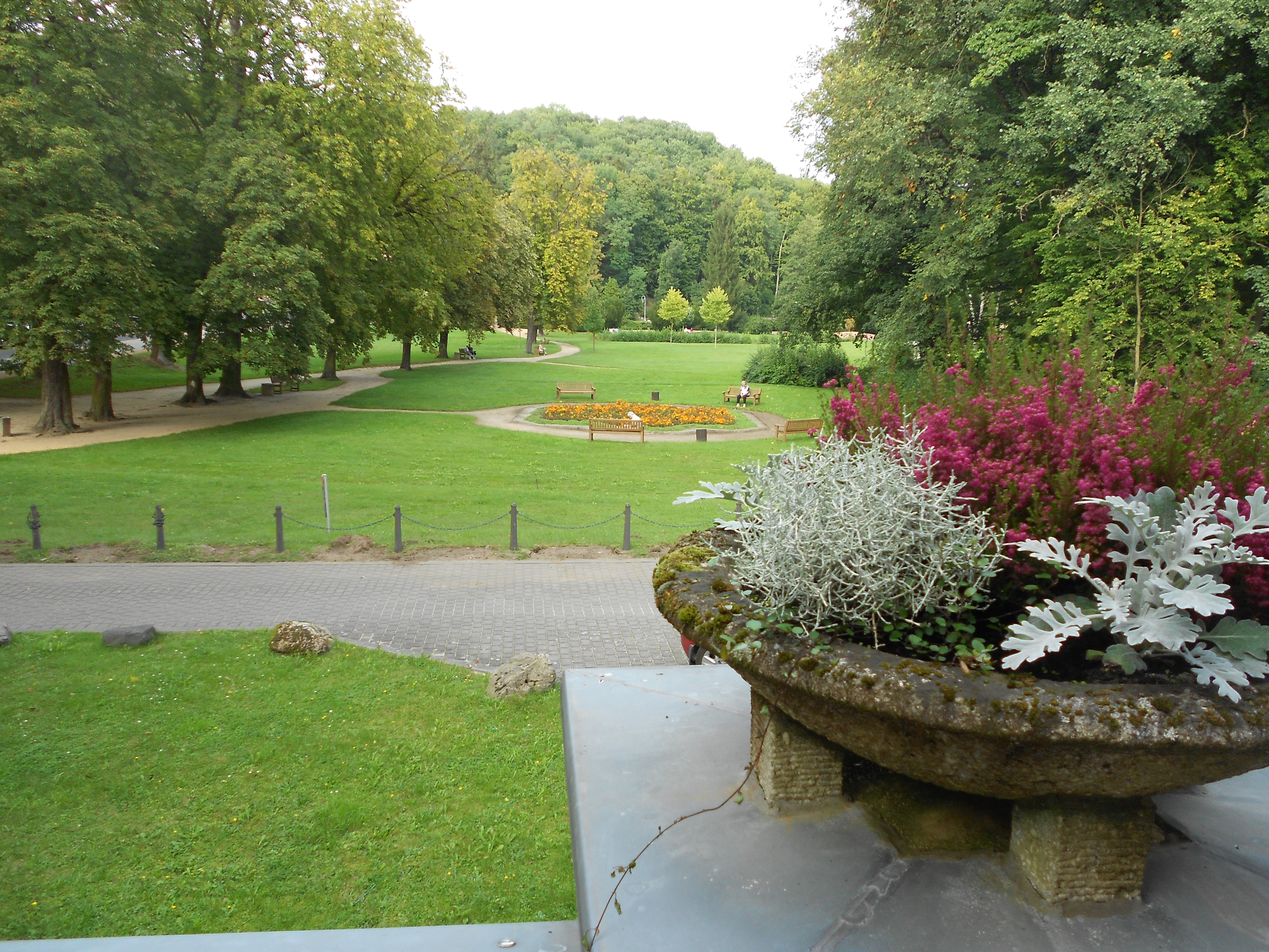 Fachklinik und Moorbad Bad Freienwalde